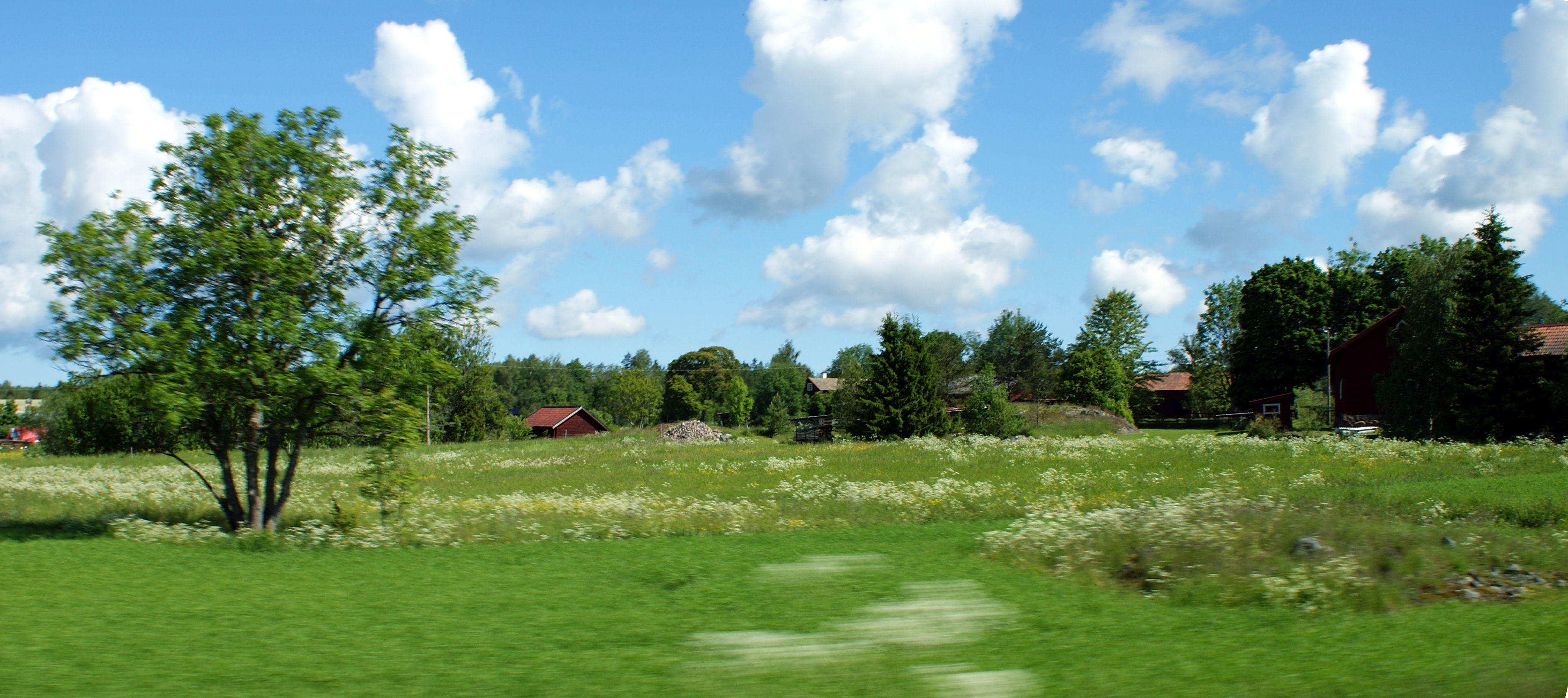 Uppskedika sett från länsväg 288